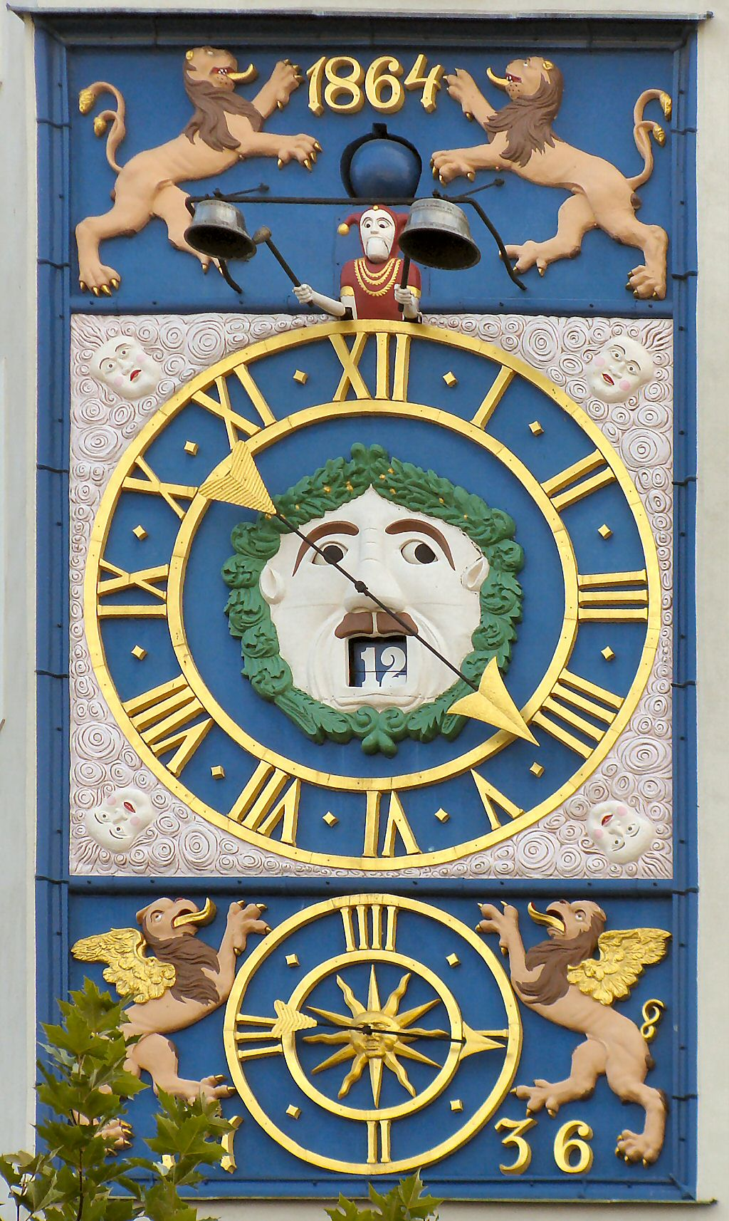 Zegar na Wieży Zegarowej Zamku Książąt Pomorskich w Szczecinie.